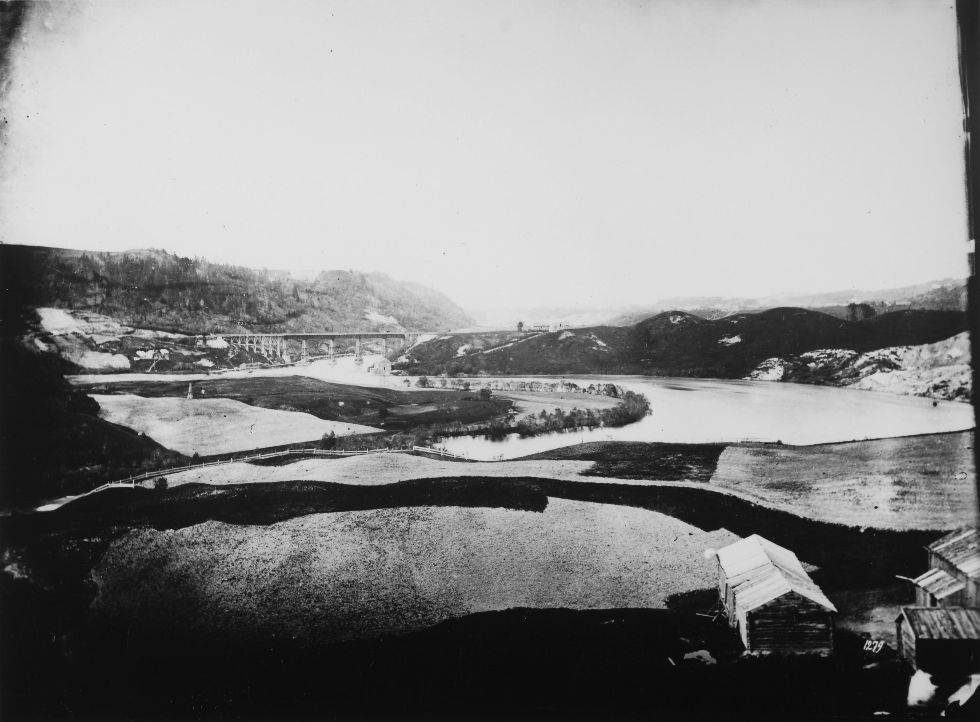 Parti fra jernbanestasjonen Sluppen ved Trondheim. Tømmerhus og åkre i forgrunnen. Sluppen stasjon, tidligere jernbanestasjon på Størenbanen, ved Sluppen bru, 3,3 km fra den gamle jernbanestasjonen i Prinsens gate; opprettet 1864, nedlagt i forbindelse med flyttingen av jernbanelinjen langs Nidelva 1884. Stasjonsbygningen ble 1893 flyttet til Tuftheim. Sluppen bru, 82 m lang veibro over Nidelva, fra Osloveien til Tempevegen, oppført av tyskerne under de 2. verdenskrig på de murte pilarene fra den gamle jernbanebroen som gikk her 1864 - 84. Den tyske broen var et provisorium, som 1954 ble erstattet av den nåværende; en stålbjelkebro med tredekke, som har tre brospenn.